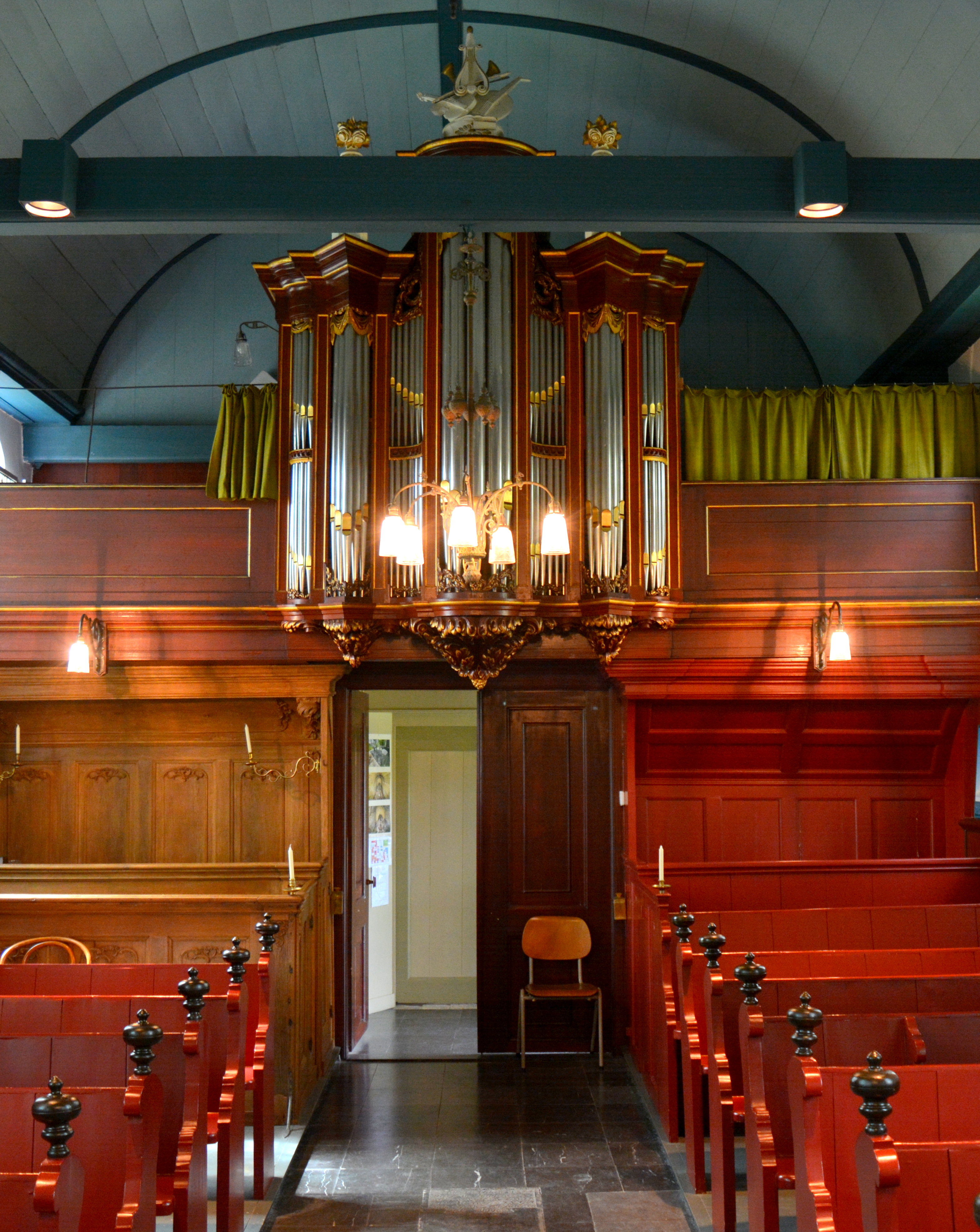 Gertrudistsjerke, Idaerd. Van Dam oargel